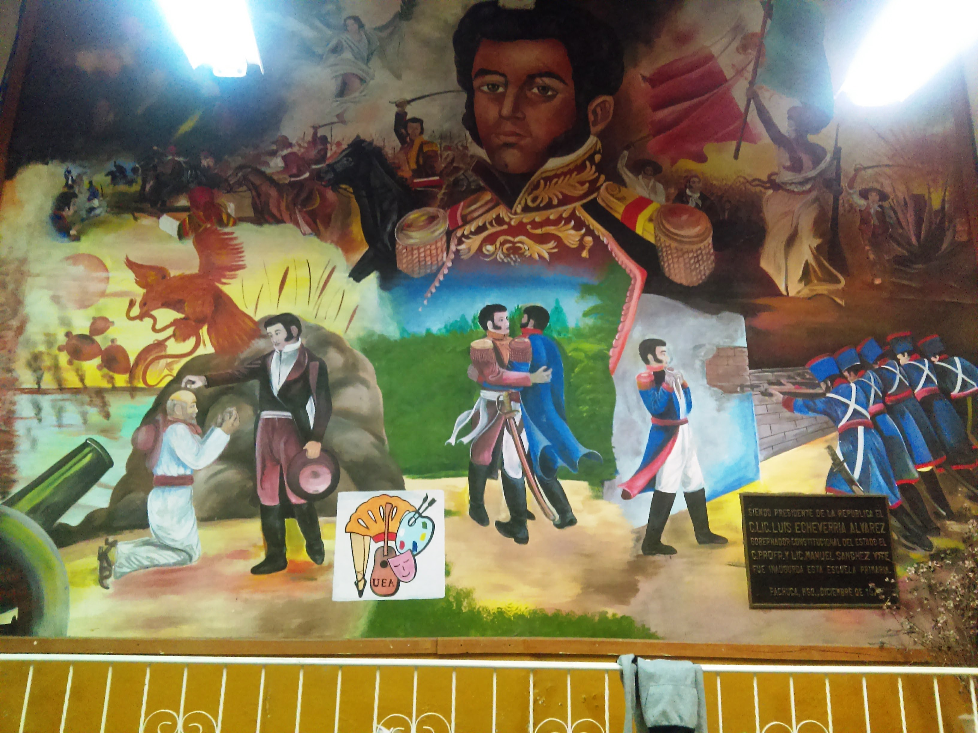 Monumento a Vicente Guerrero en la Casa Colorada en Pachuca, México.